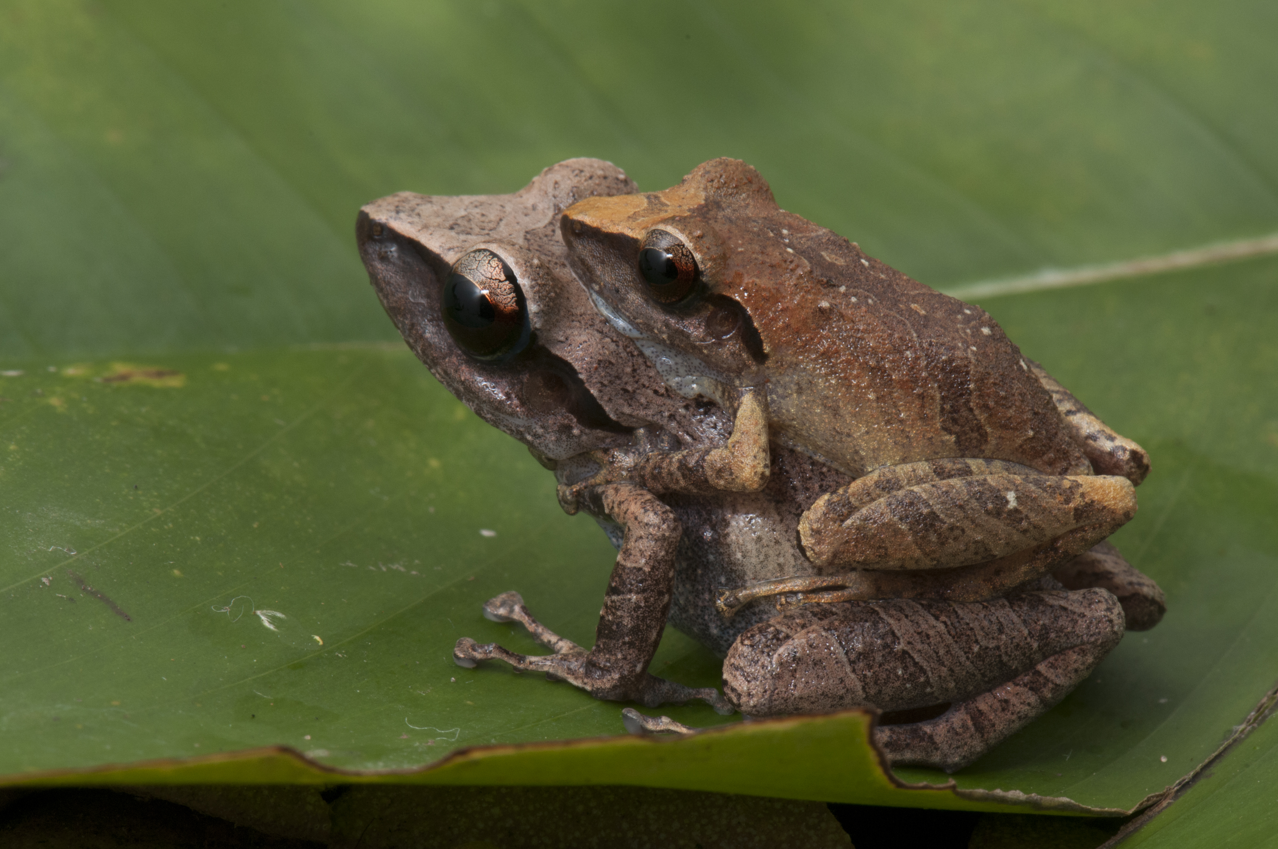 Sapo de folhiço - Pristimantis vinhai - Espécie encontrada apenas no Sul da Bahia, na imagem um casal em amplexo, a procura do ambiente certo para desova.